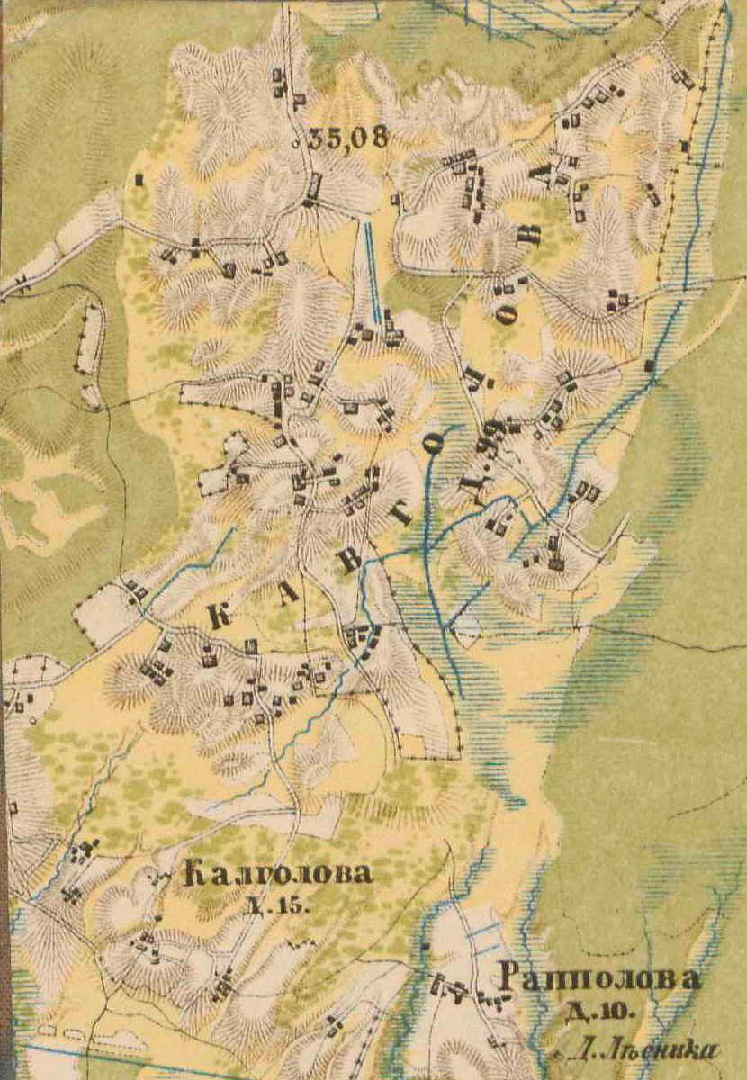 План деревни Кавголово. 1885 г.